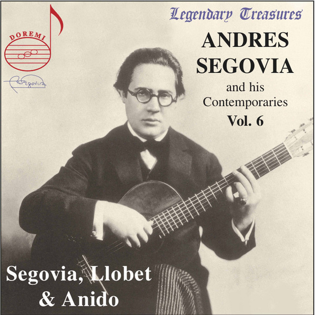 Foto de Segovia on consten el seu nom i els de Llobet i Anido.